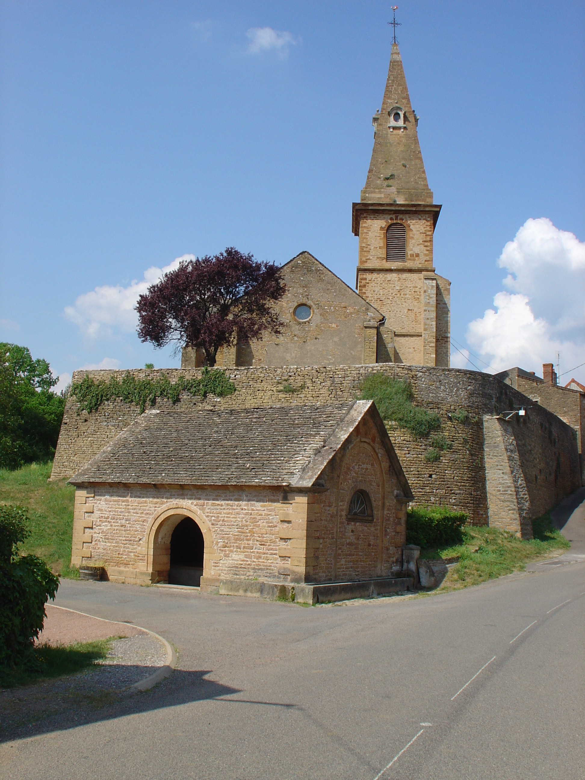 Commune d'Etrigny (71 - France).